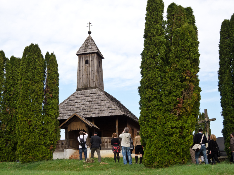 Lipik Drvena kapela sv. Andrije u Brezinama